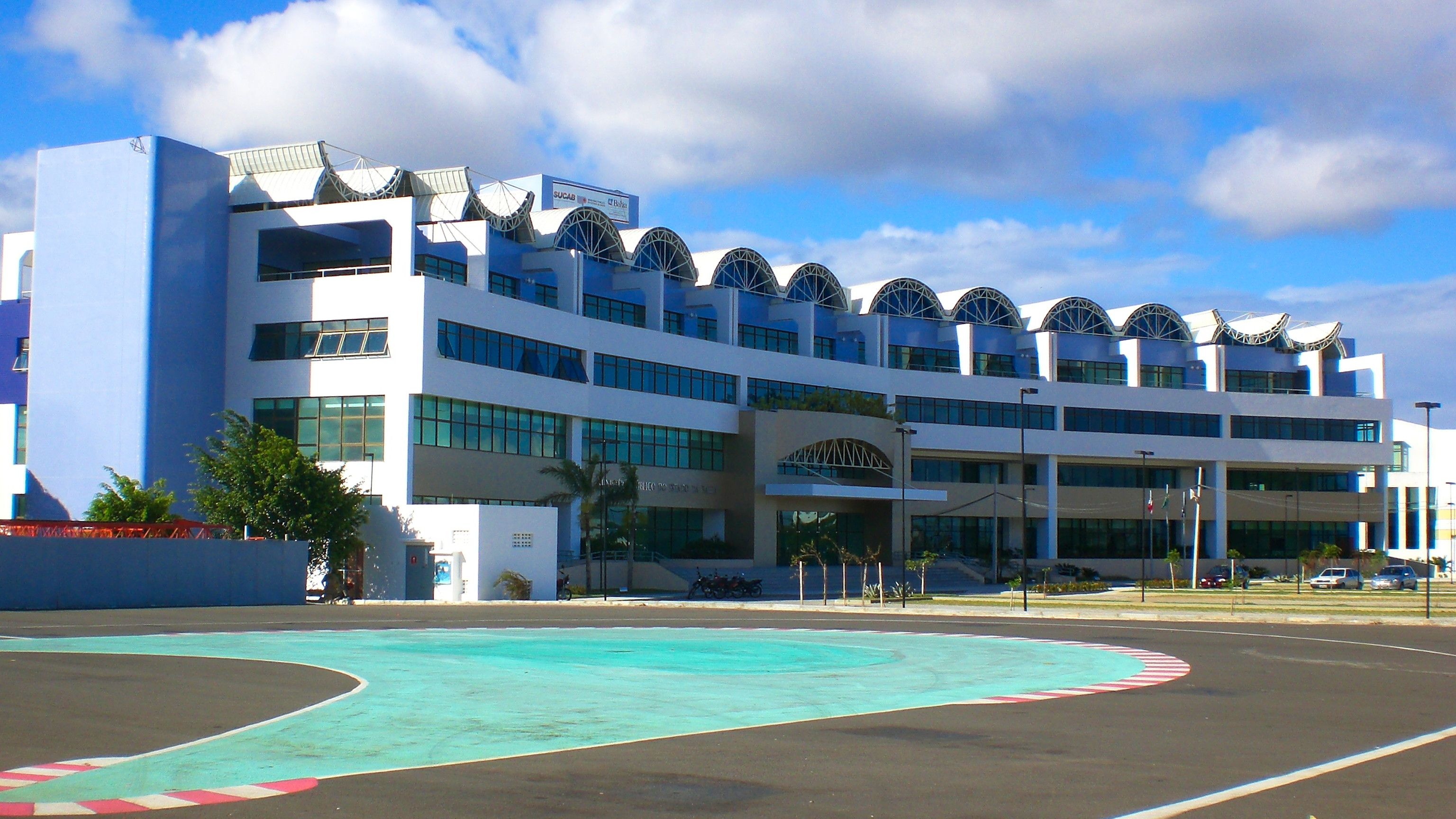 Sede do Ministério Público do Estado da Bahia, no Centro Administrativo da Bahia, em Salvador, Bahia, Brasil.